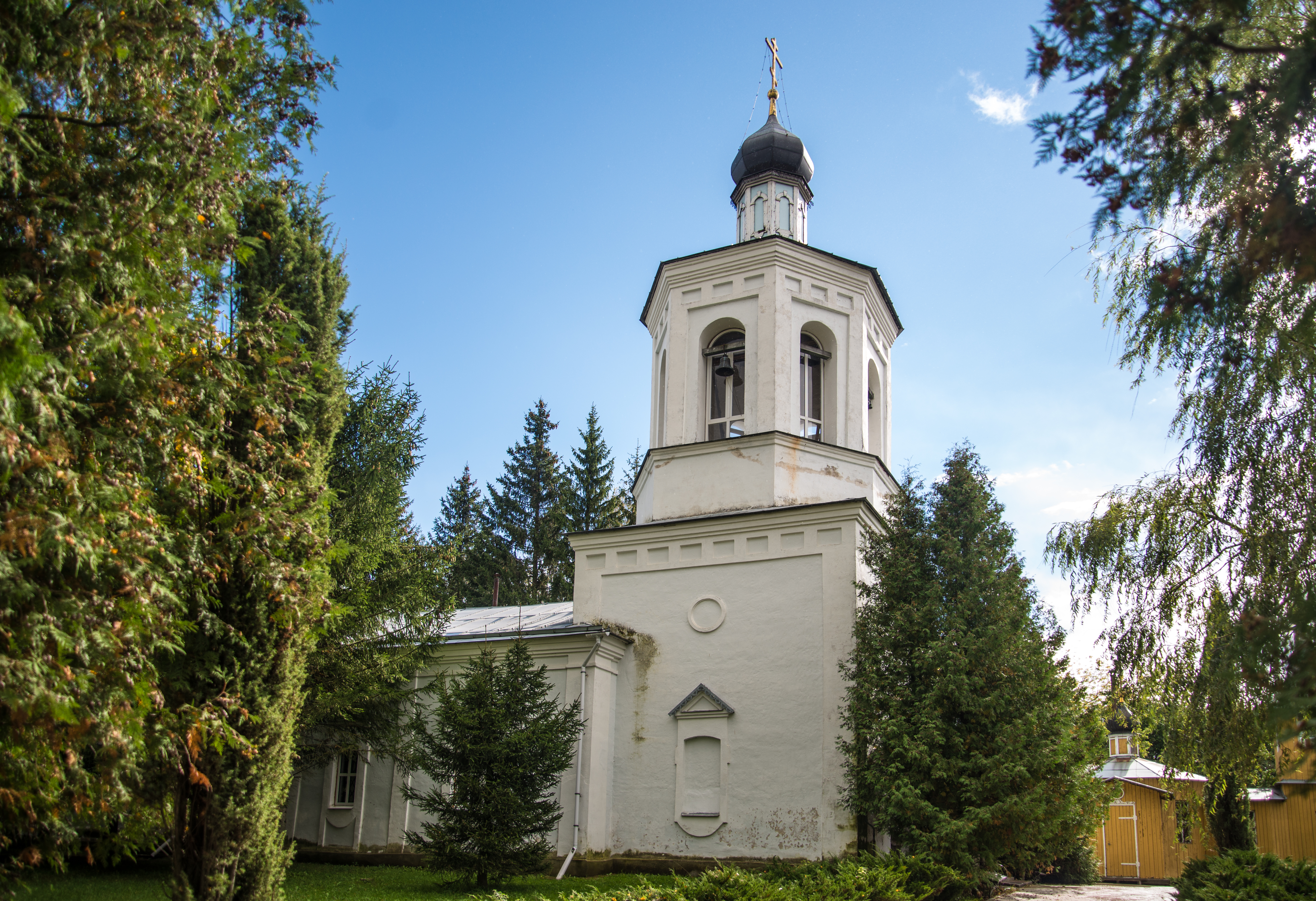 Церковь Антония и Феодосия Печерских: Печерск, Смоленский район, Смоленская область